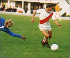 Pinino mas en la decada del 60